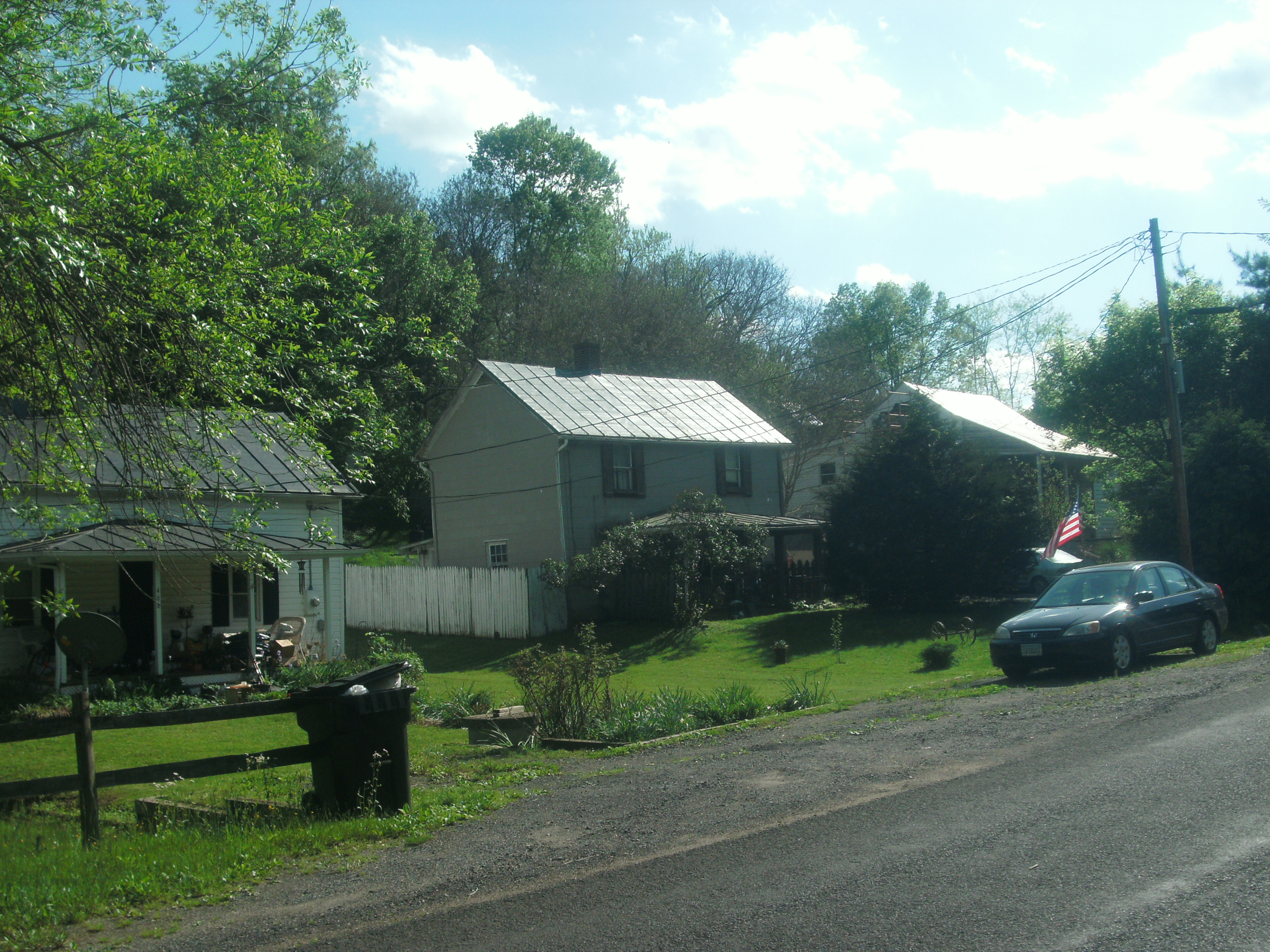 Laurel Mills, Virginia GEDSC DIGITAL CAMERA